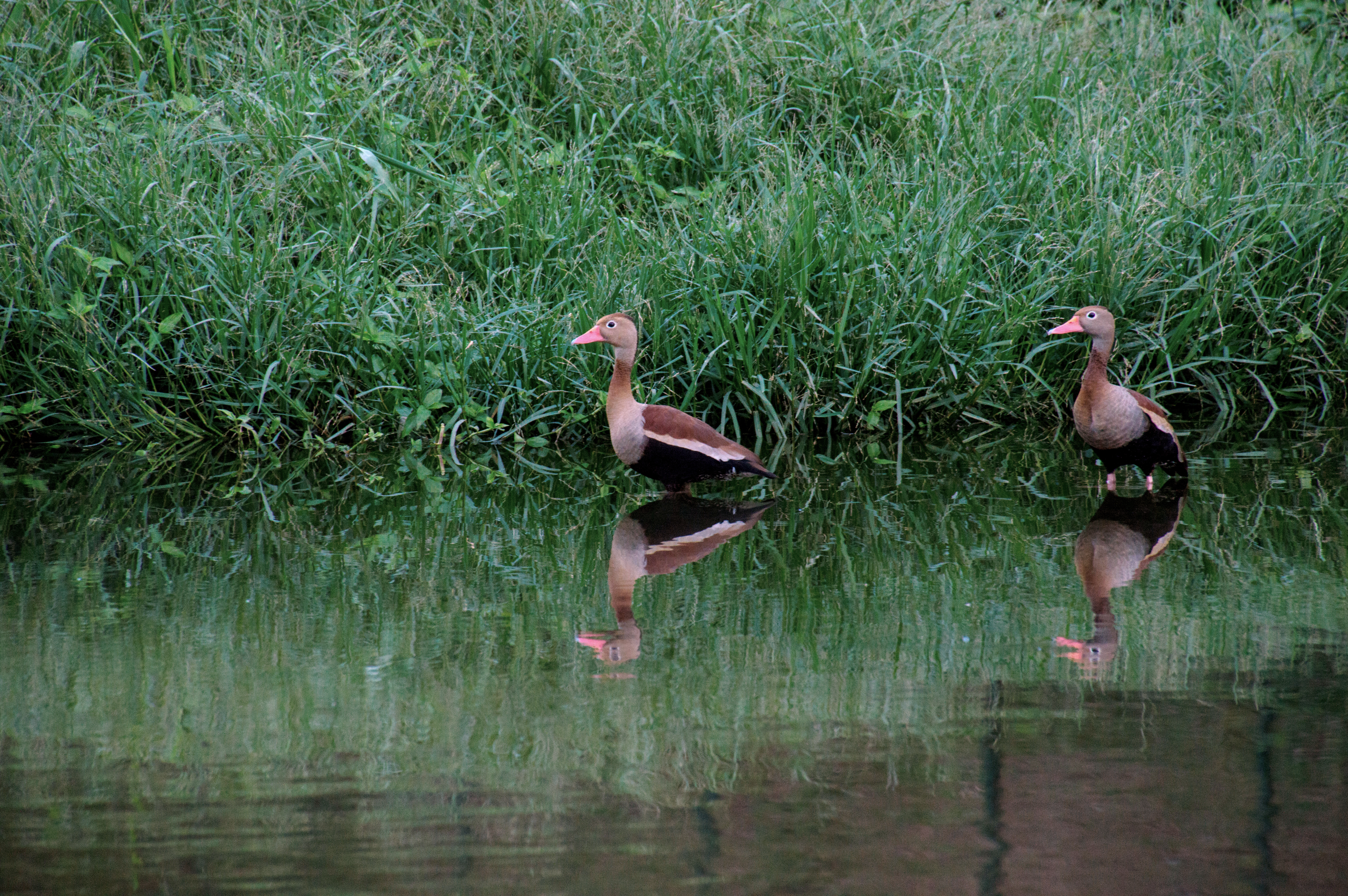 Ambiente Lacustre, Lagoa da Pampulha, Belo Horizonte, MG, Brasil.